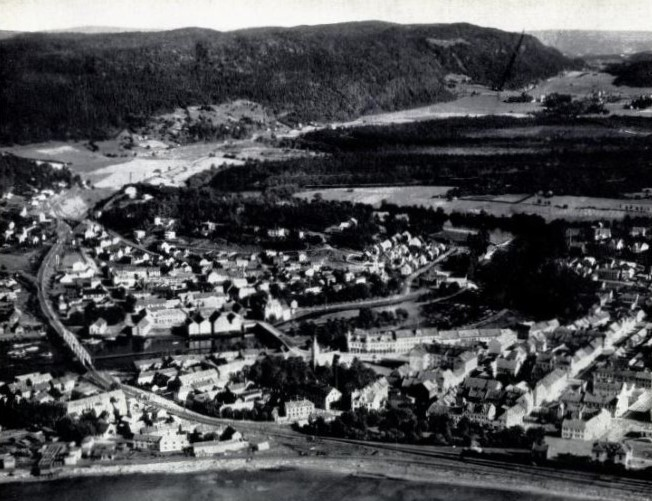 Steinkjer før bombingen i april 1940. Reprofoto.